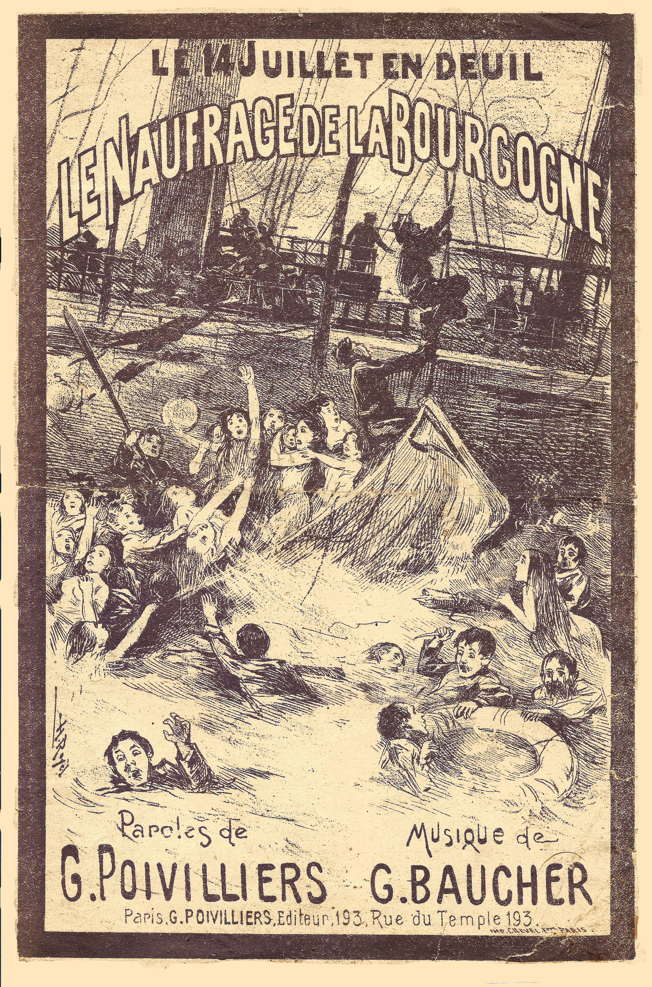 Partition de "Le Naufrage de la Bourgogne" ; ce naufrage eut lieu le 4 juillet 1898.